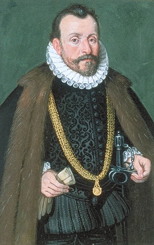 Freiherr Reichard Streun von Schwarzenau (1538-1600) im Beckschen Porträtbuch des KHM Wien